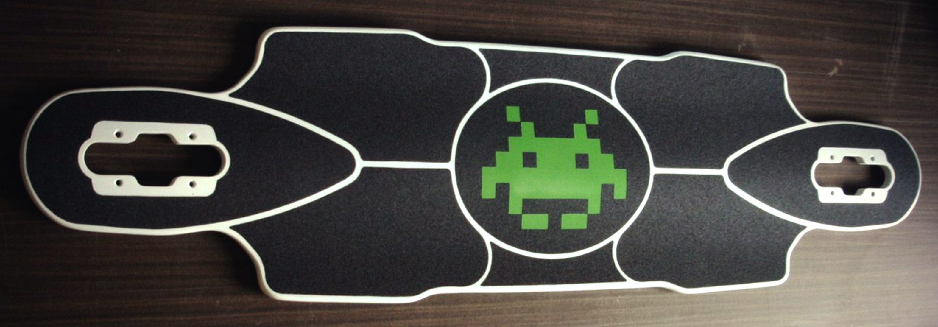 Дека лонгборда от lowboard